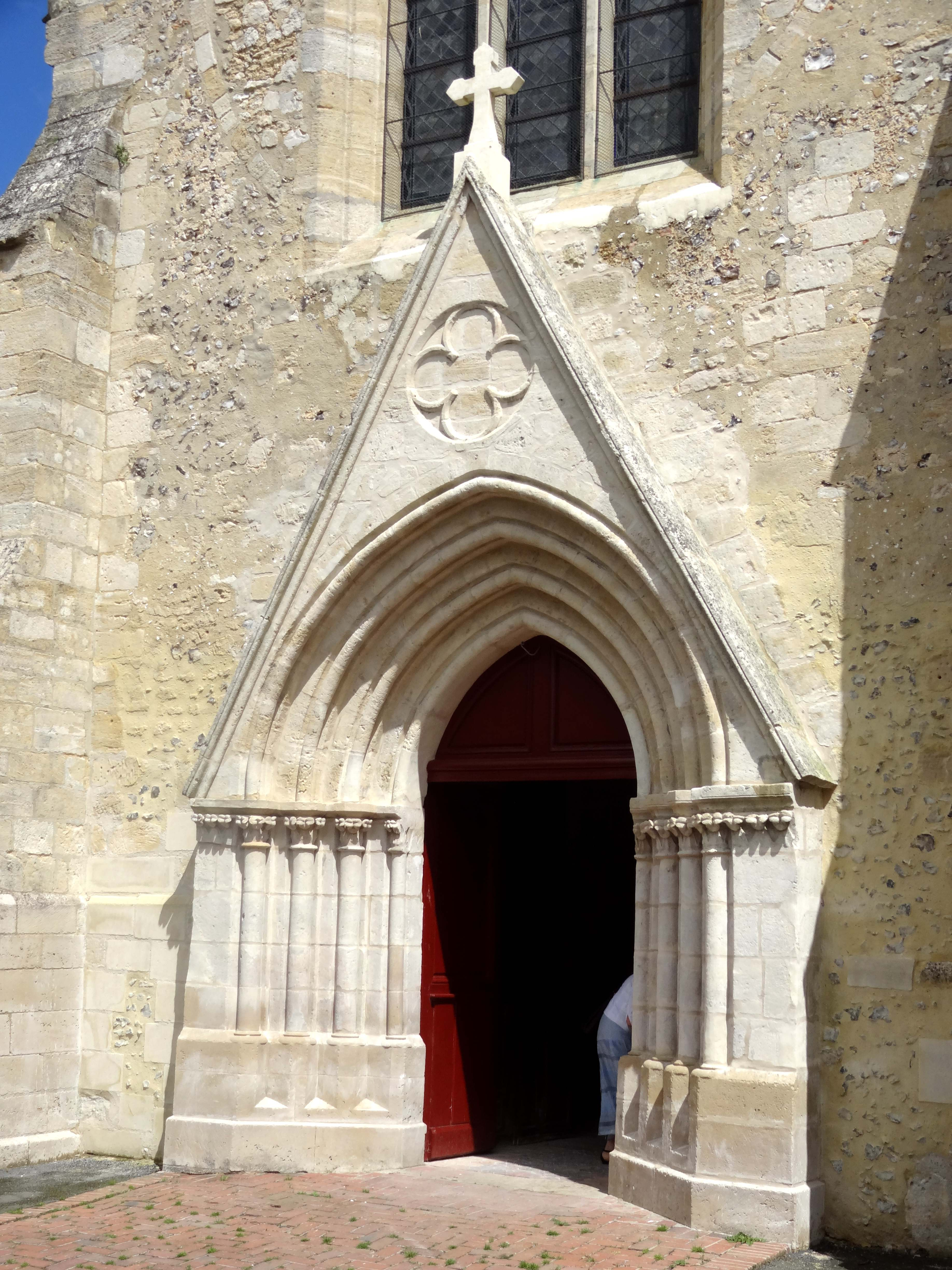 Église Saint-Crépin-et-Saint-Crépinien de Saint-Crépin-Ibouvillers - voir titre.